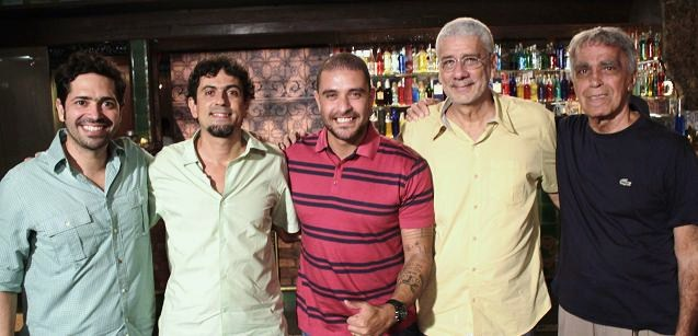 Os Cariocas é um conjunto vocal, criado por Ismael Neto em 1942, cujo repertório é a música popular brasileira (MPB). Na foto, na companhia do compositor e cantor de sambas, Diogo Nogueira.